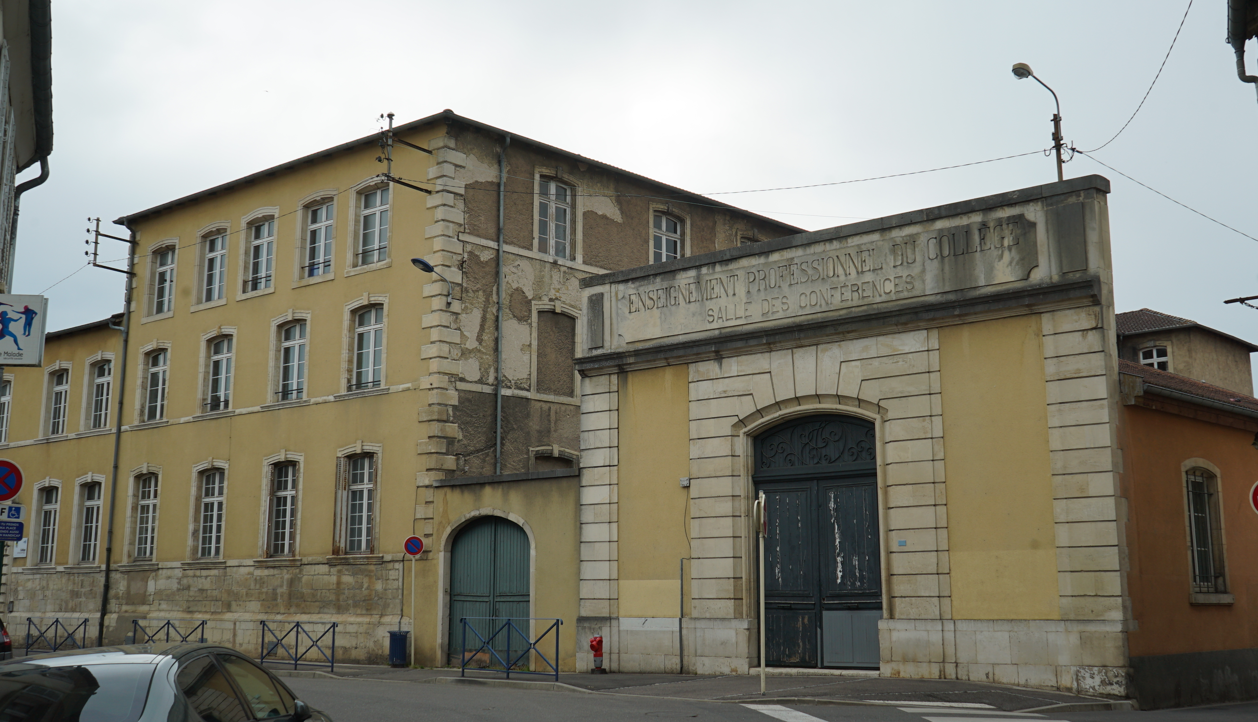 à Toul.